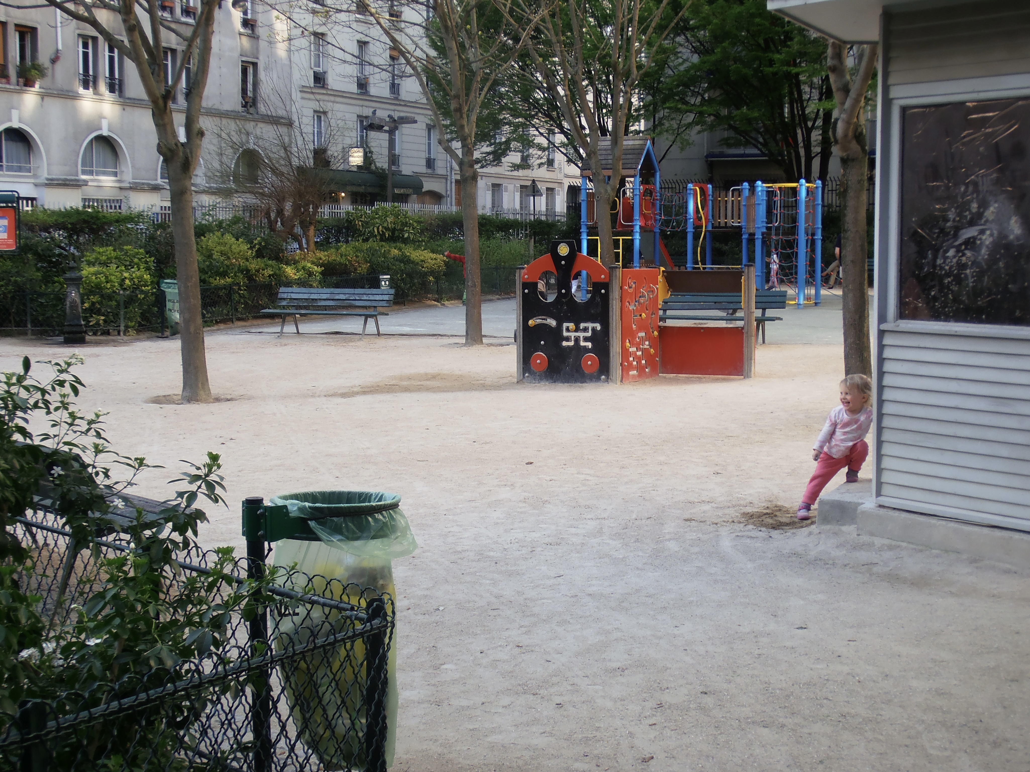 Paris, quartier du canal St Martin